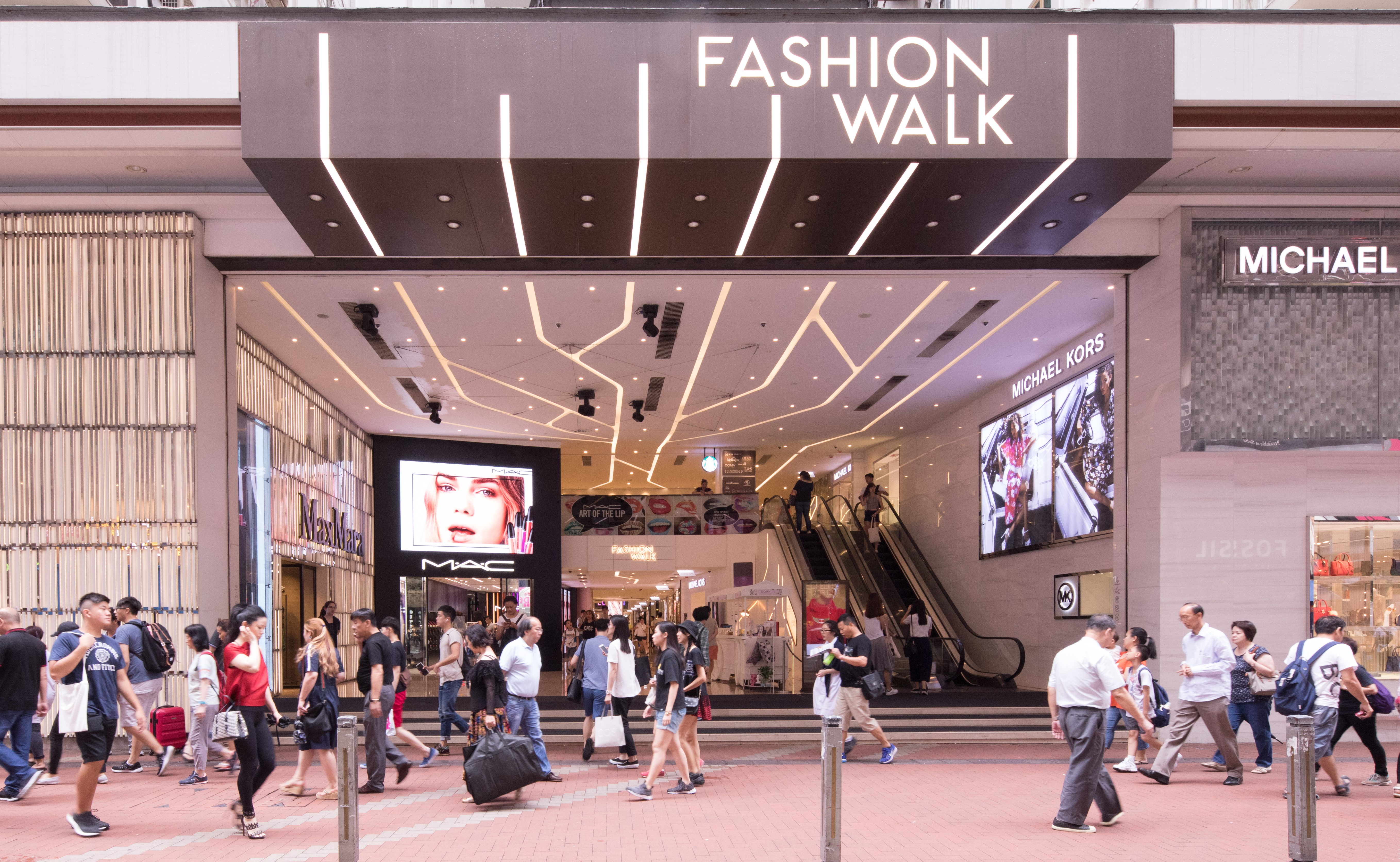 中文（香港）: 翻新後的Fashion Walk室內商場 (2017年8月